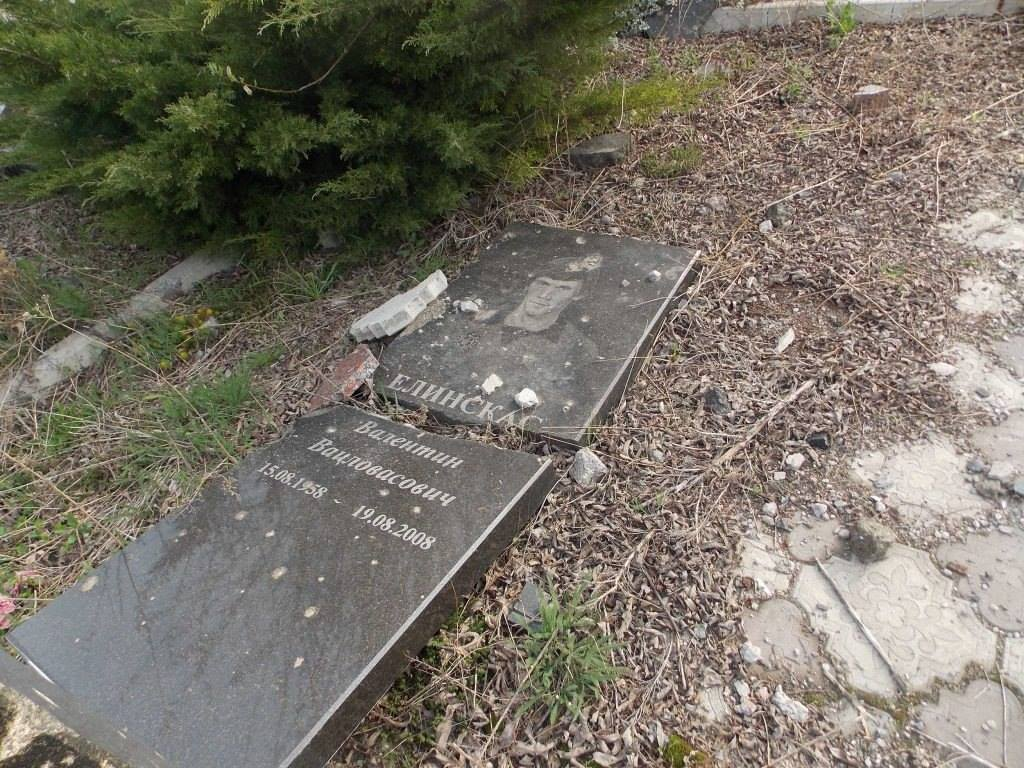 Донецк, кладбище